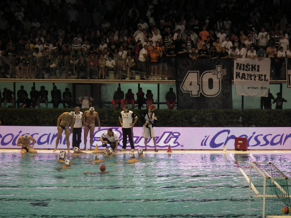 La squadra del Partizan a rapporto dall'allenatore Igor Milanović